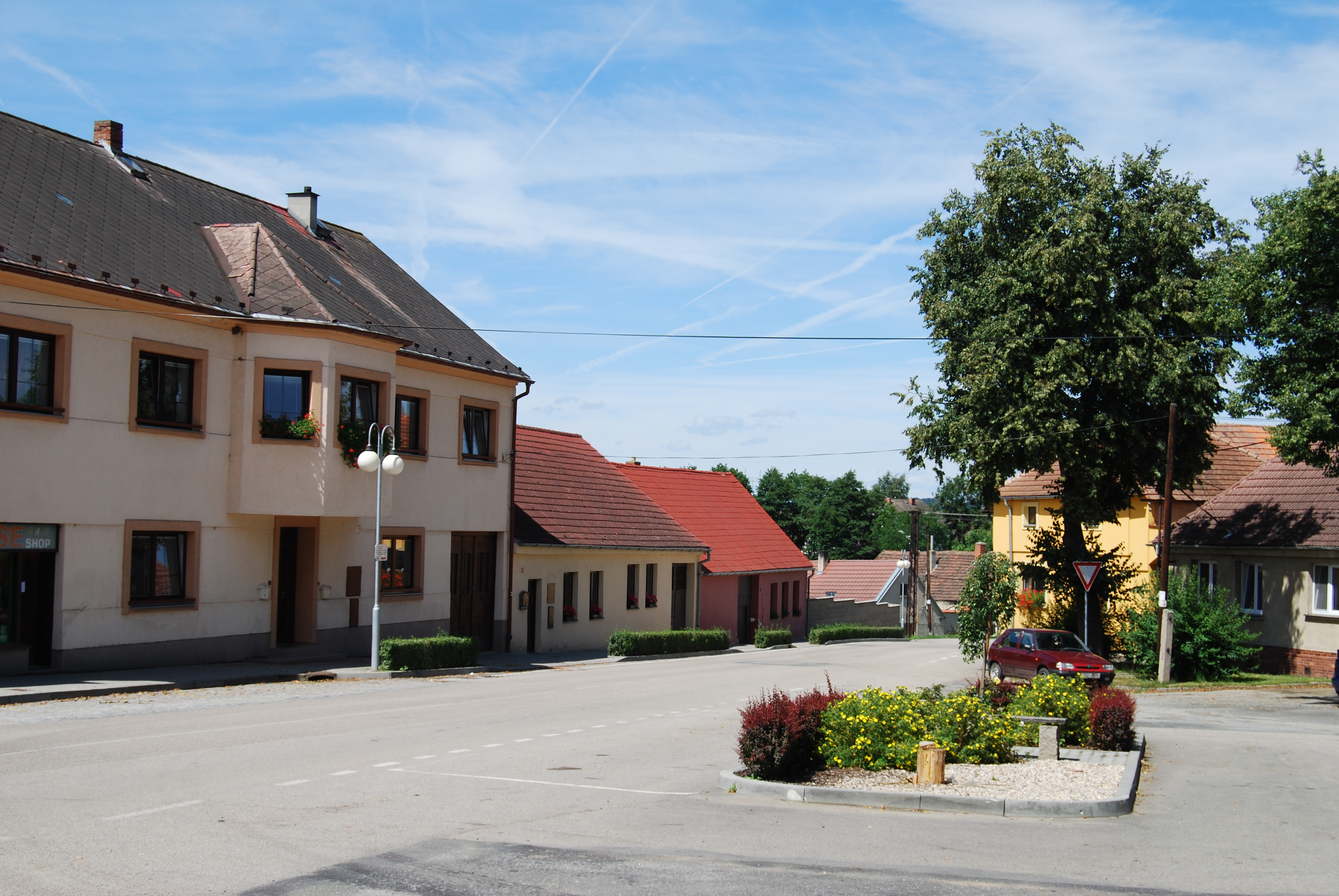 Pohled na náves. Obec Kondrac v okrese Benešov, kraj Středočeský. Česká republika.